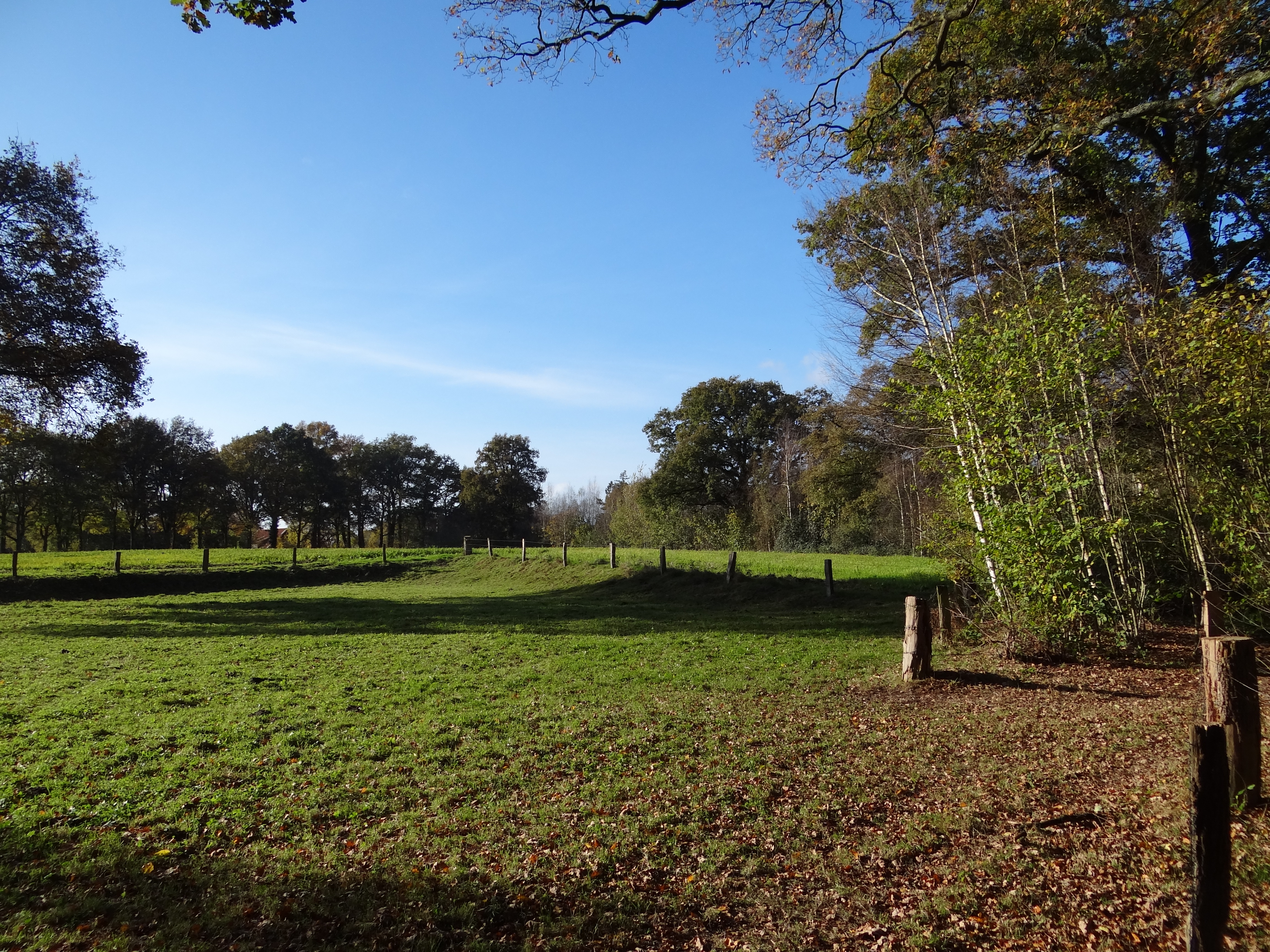 Impressie, herfstsseizoen op het landgoed Walfort